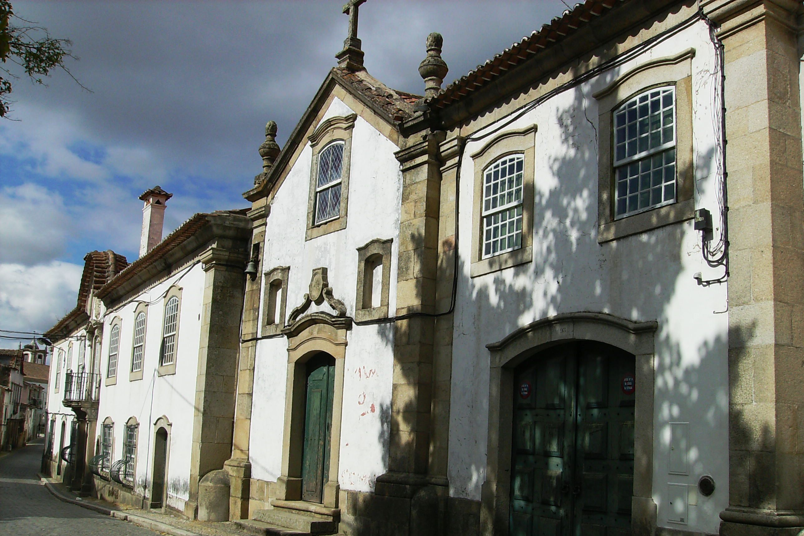 Solar Viscondessa de Oleiros e Capela